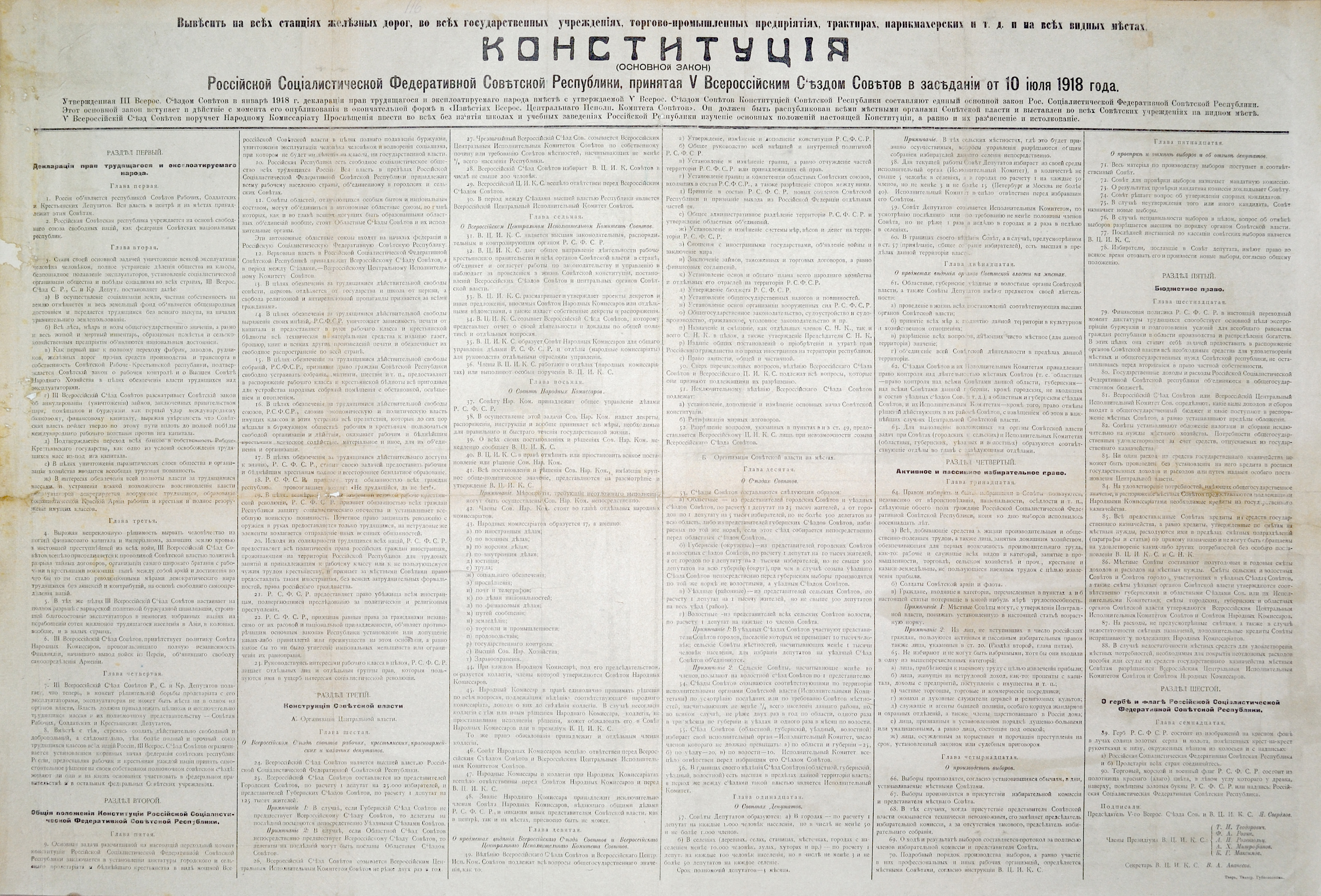 Текст Конституции РСФСР 1918 года, напечатанный в типографии Тверского губисполкома в виде плаката.